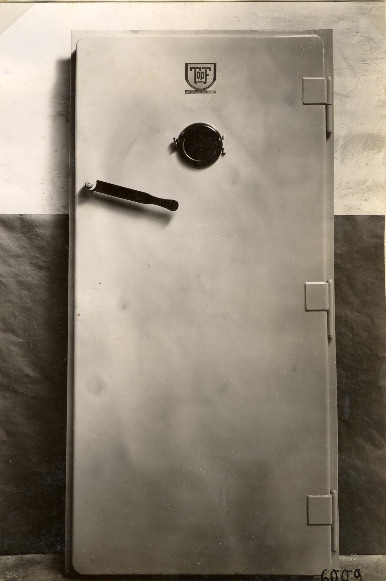 Zitierweise: Landesarchiv Thüringen – Hauptstaatsarchiv Weimar, J. A. Topf & Söhne Erfurt, Nr. 260, Bl. 57r (2) alte Archivsignatur: 6009 Bildbeschriftung: Gasdichte Tür [maschinenschriftlich]. Laufzeit: [vor 1943] Text im Bild: [Firmenlogo auf der Tür:] TOPF Beschreibung: Gasdichte Stahltür, vor Wand aufgestellt und im Scharnier und Türrahmen, Außenansicht: Öffnungshebel und runde Öffnung auf Kopfhöhe, Firmenschild. Format: Hochformat 160 x 115